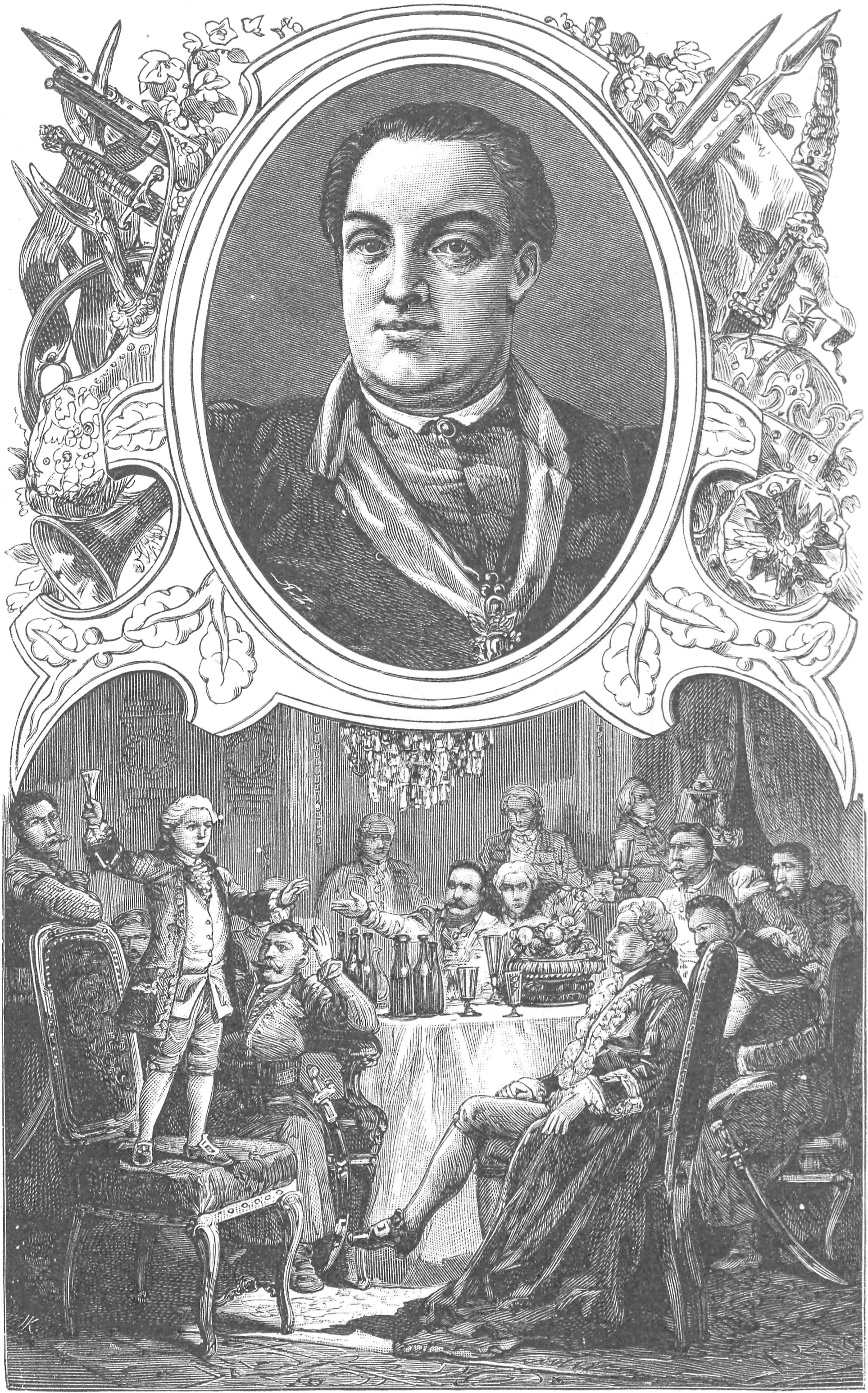 ilustracja z książki „Wizerunki książąt i królów polskich“